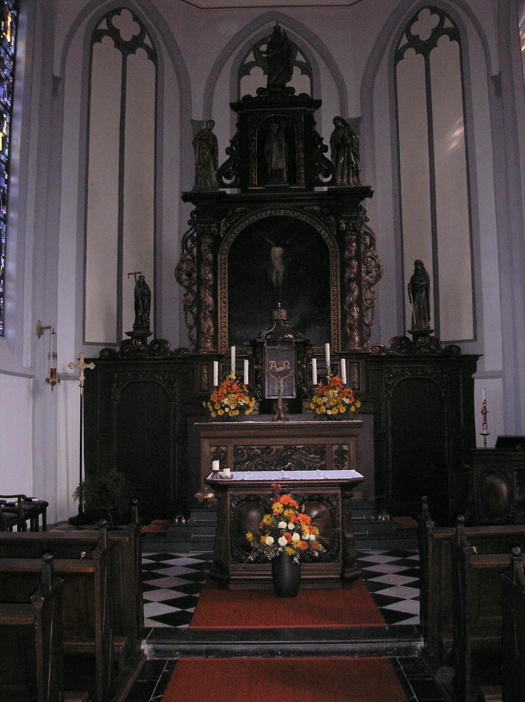 Hochaltar der Kirche St. Martinus in Mehr, Gemeinde Kranenburg